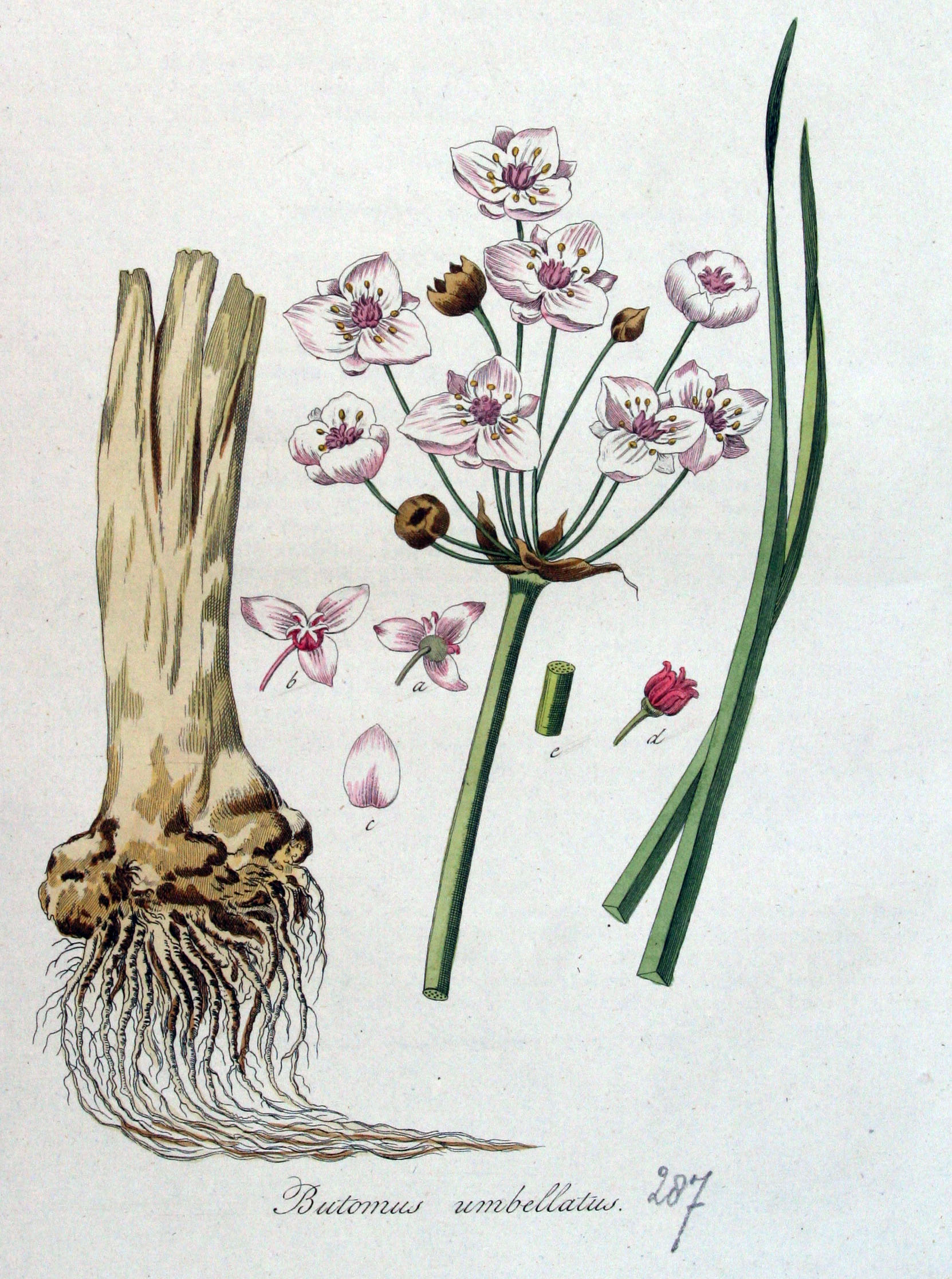 Butomus umbellatus L.